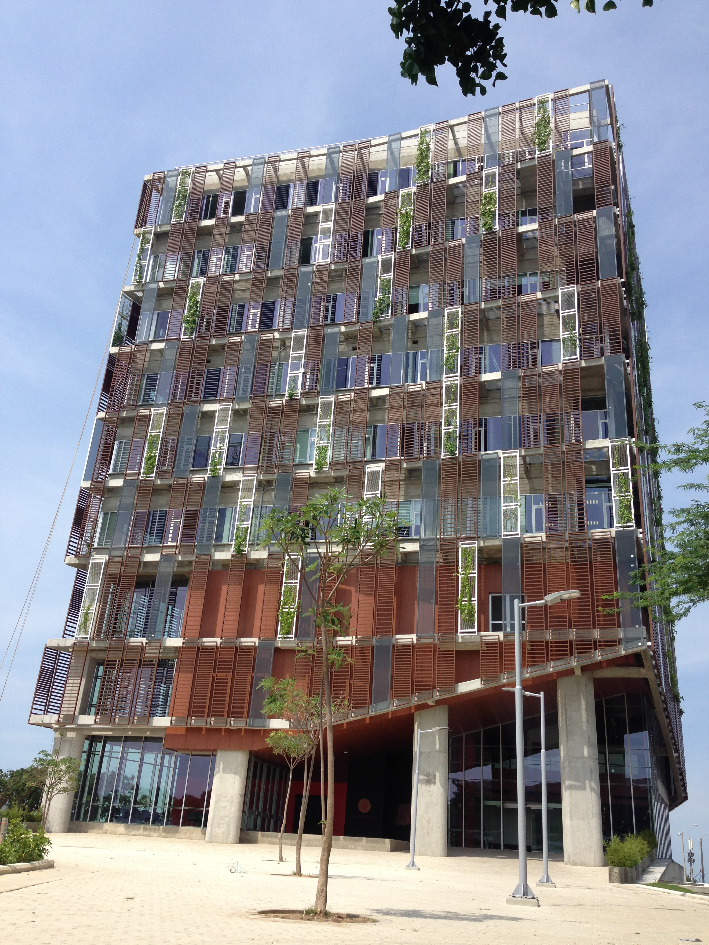 Edificio Multipropósito de la Universidad del Norte.